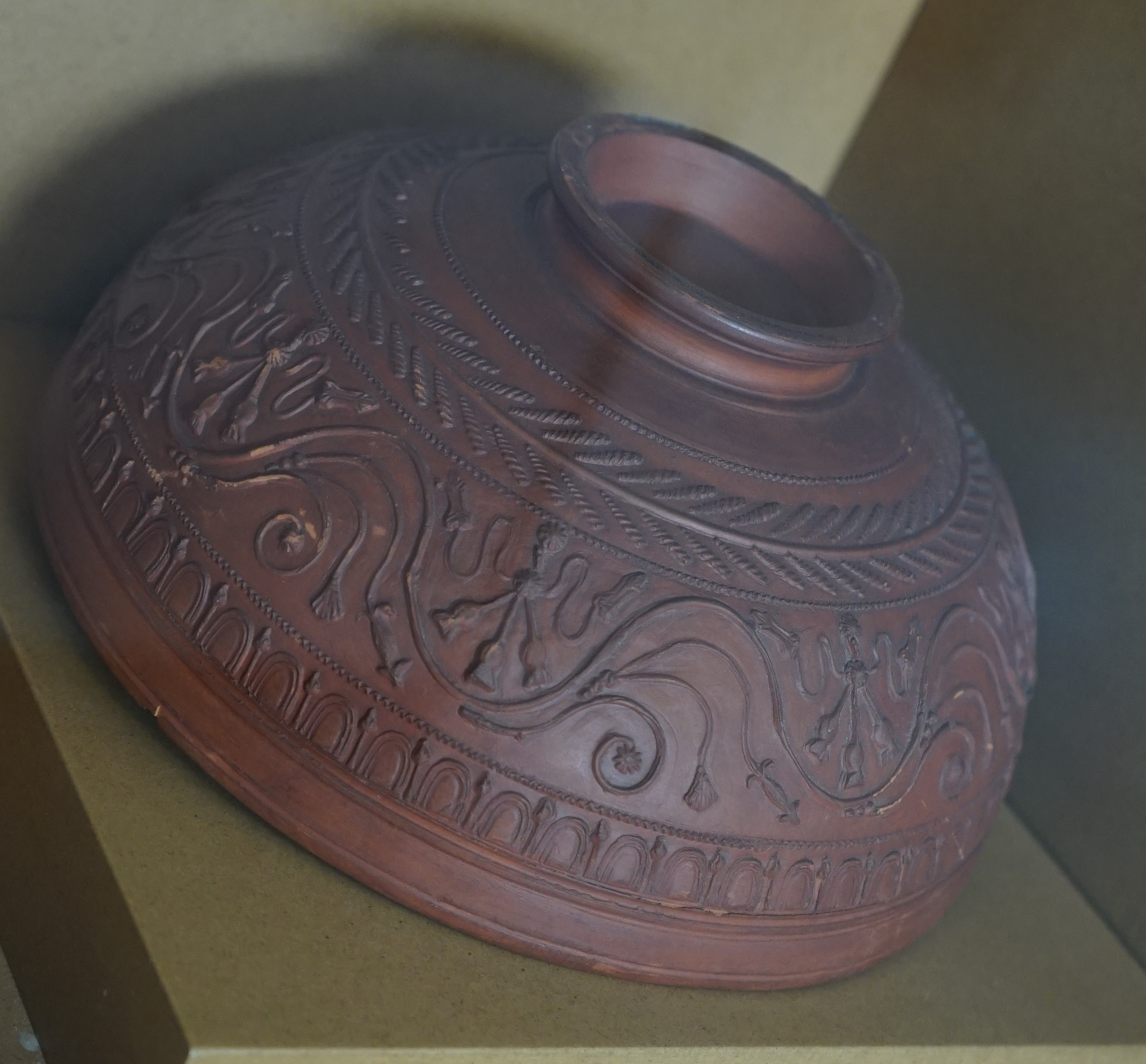 plat creux en argille sigillée obtenu par moulage, dépot du musée de l'Argonne, in ː 6-938-1-44D-408, présenté au msuée de COmmercy.